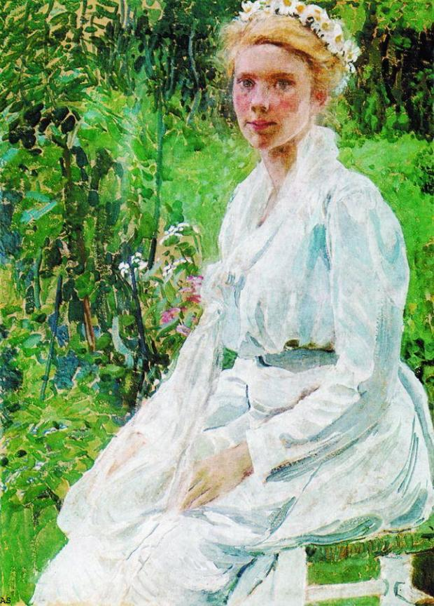 Финская Девушка. 1908